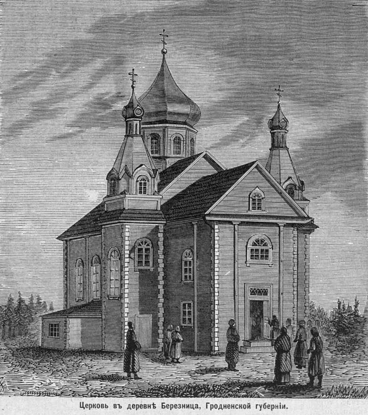 Церковь в Березнице, 1871 год